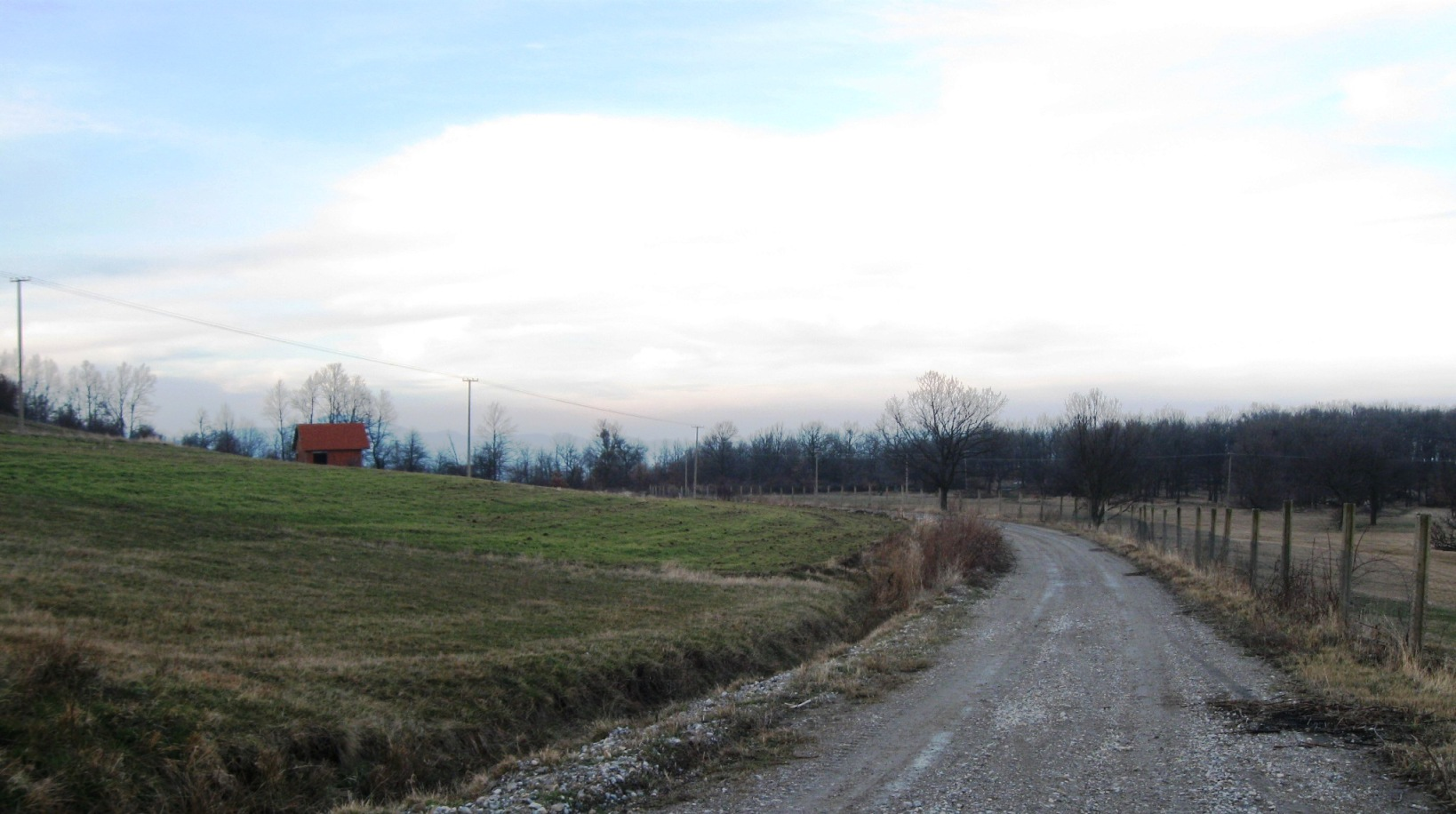 Dobra Voda, Bojnik